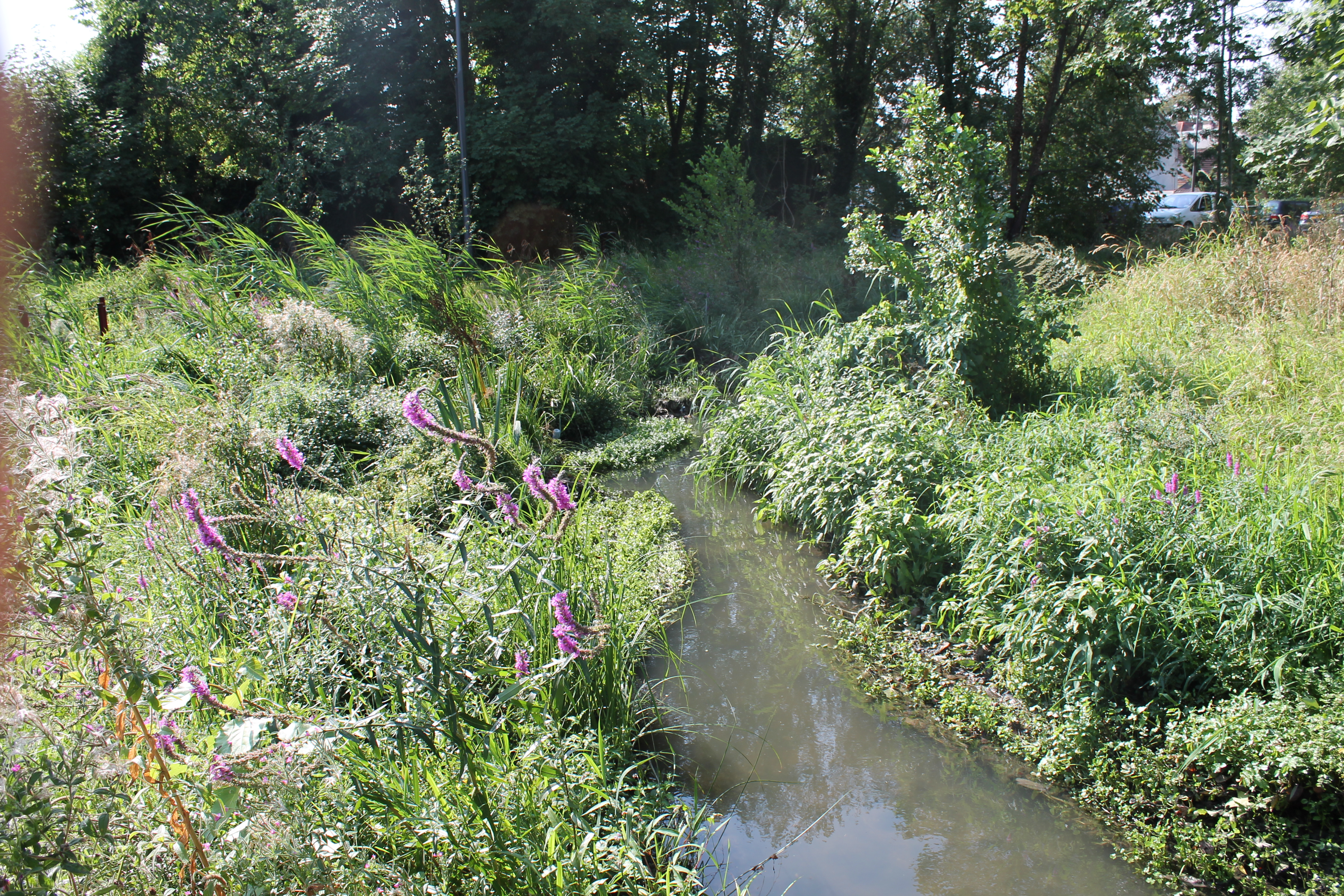 Portion du Petit Rosne à Sarcelles renaturé par le SIAH (2015)